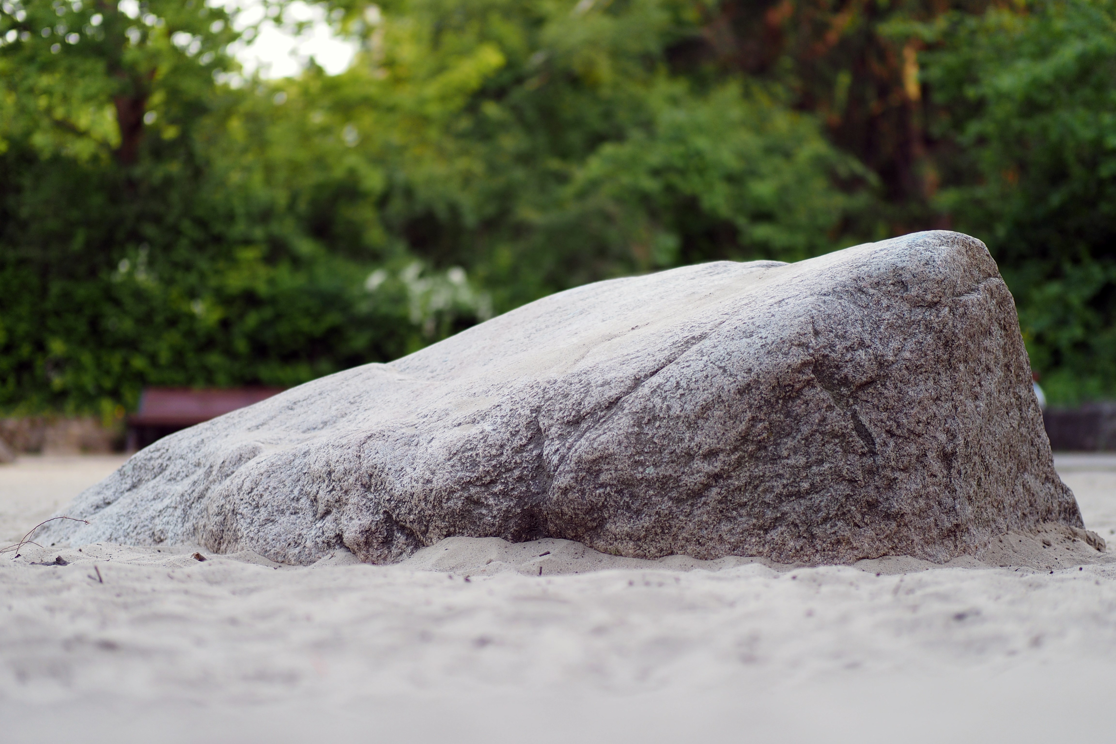 Naturdenkmal 7-6/F auf dem Spielplatz Alboinplatz, kleinerer der beiden Findlinge